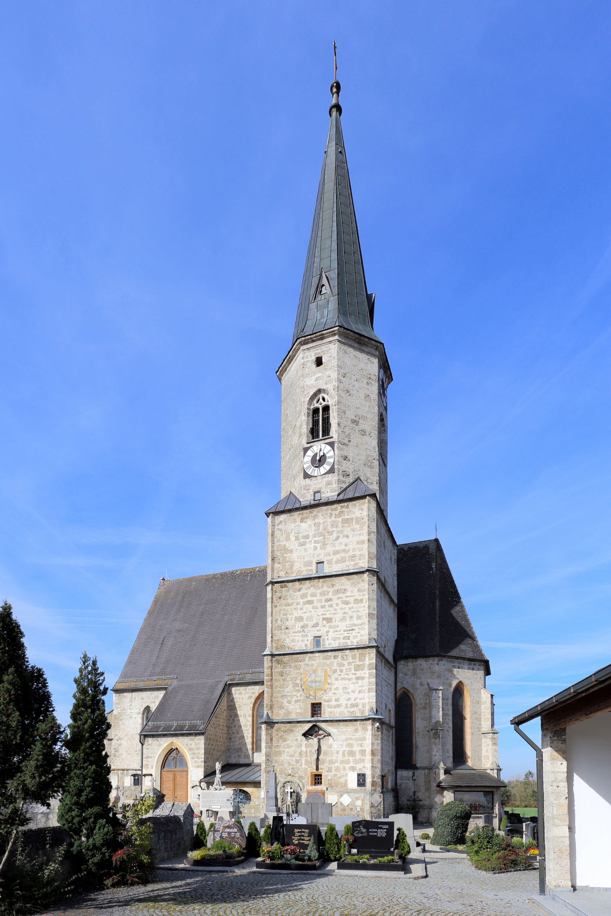 Südostansicht der katholischen Pfarrkirche Mariä Himmelfahrt in der oberösterreichischen Gemeinde Kirchdorf am Inn. Ein gotischer Tuffsteinbau mit einem mächtigen Turm im südlichen Chorwinkel, einem einschiffigen, dreijochigen Langhaus und einem leicht eingezogenen, zweijochigen Chor (datiert mit 1486).